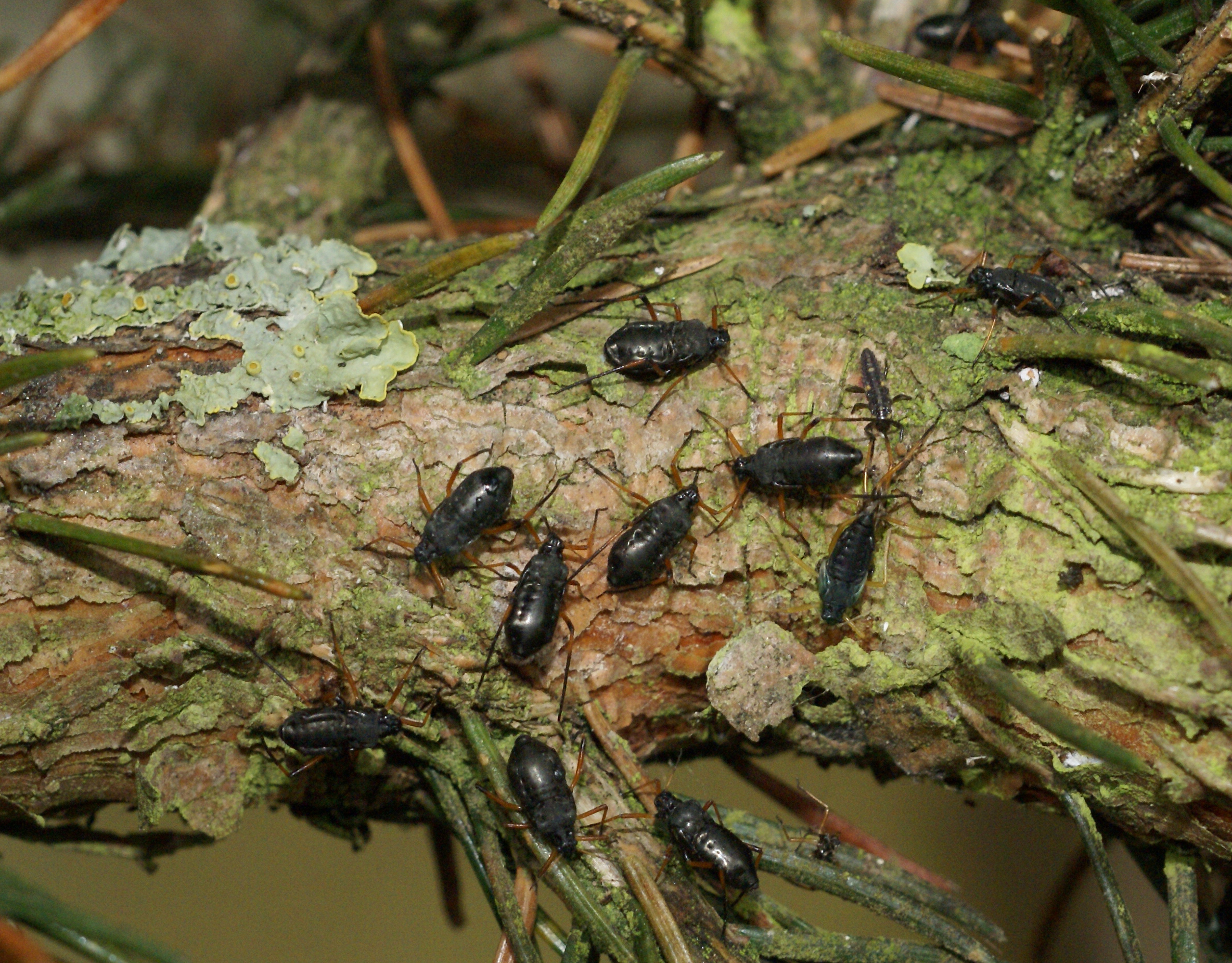 Grosse schwarze Fichtenrindenlaus (Cinara piceae)